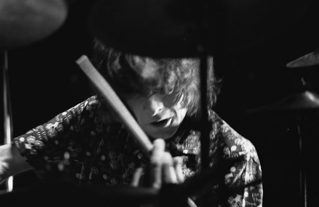 Trommeslager i Procol Harum.